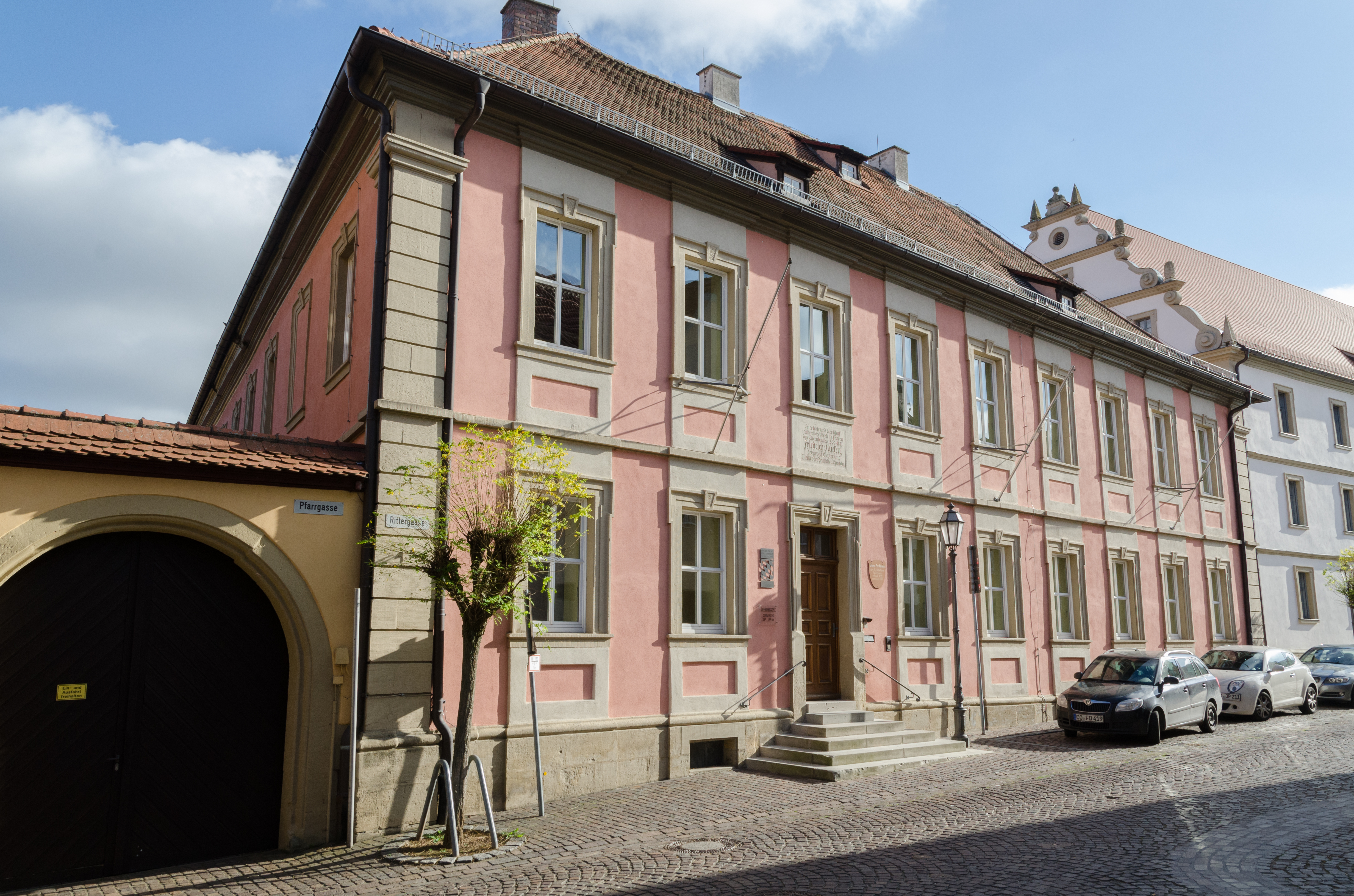 Ebern, Rittergasse 1